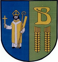 Herb Bobowa